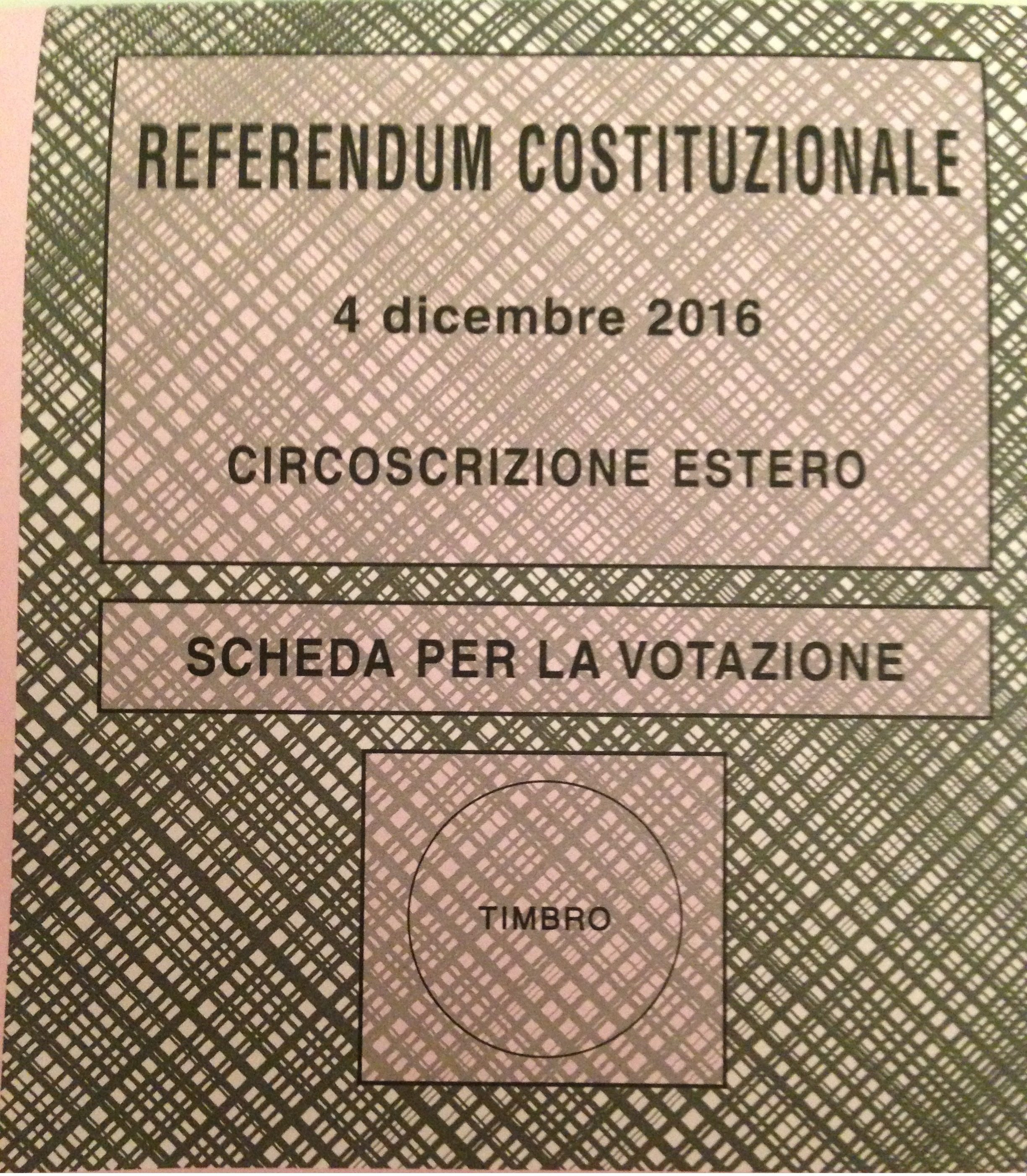 Referendum costituzionale del 4 dicembre 2016. Frontespizio della scheda referendaria destinata al voto per corrispondenza dei cittadini italiani residenti all'estero.